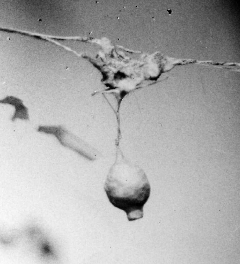 Cocon d' Argyrodes argyrodes et son pédicule